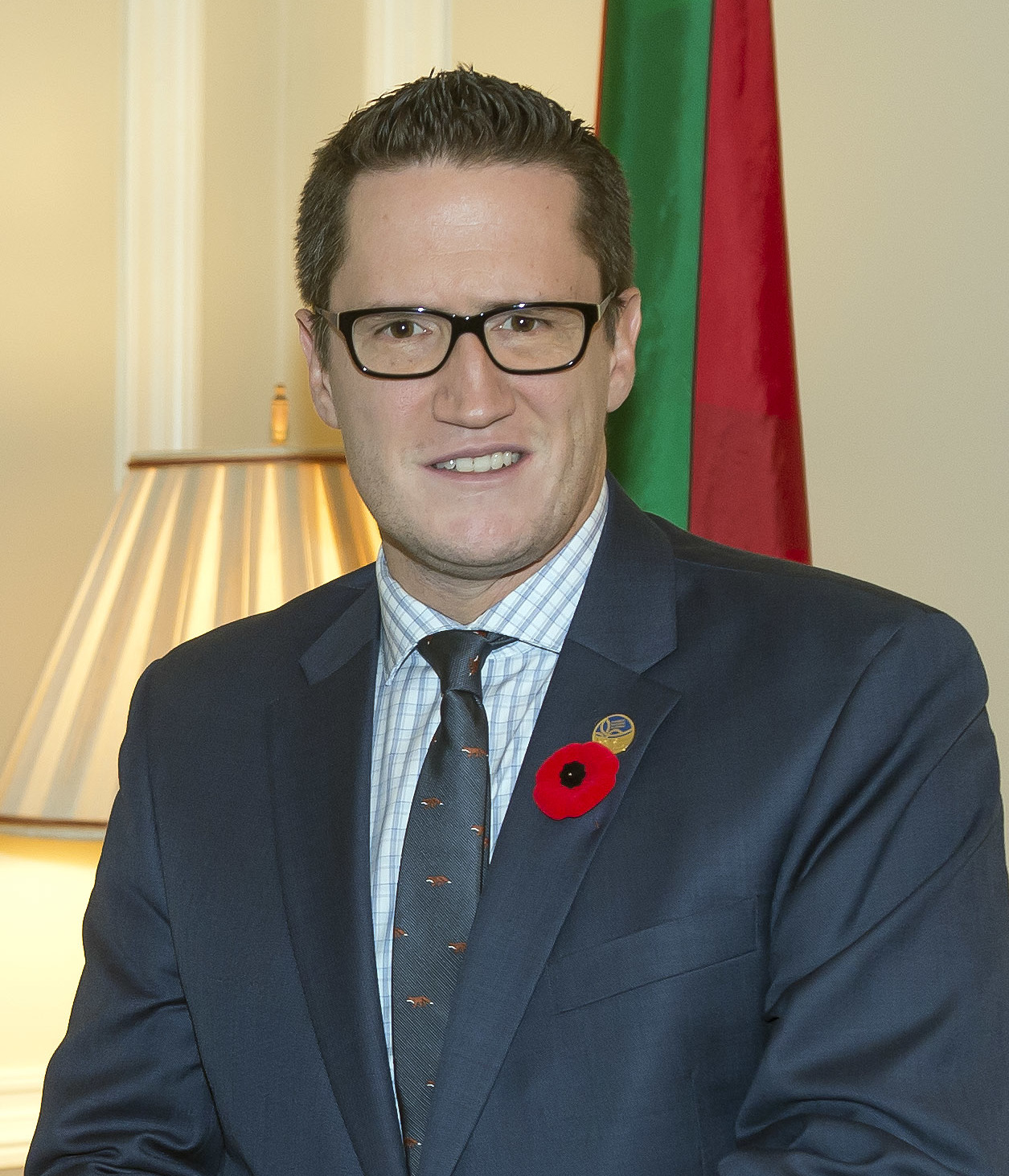 Quebec-era bidaia ofiziala:Lehendakariak Quebec-eko Legebiltzarra bisitatuko du